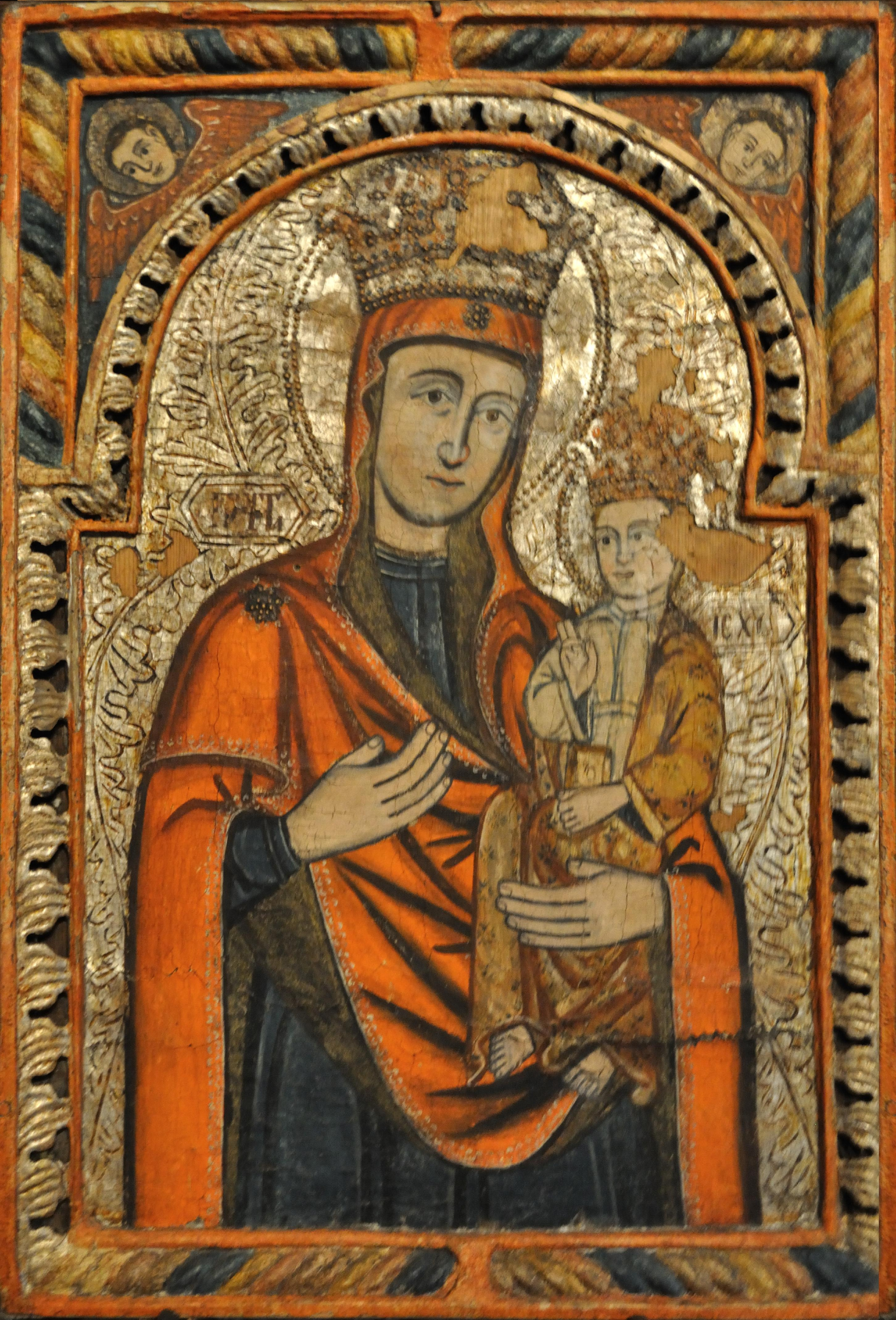 Biserica de lemn din Budești-Josani, județul Maramureș. Icoană împărătească: Maica Domnului cu Pruncul